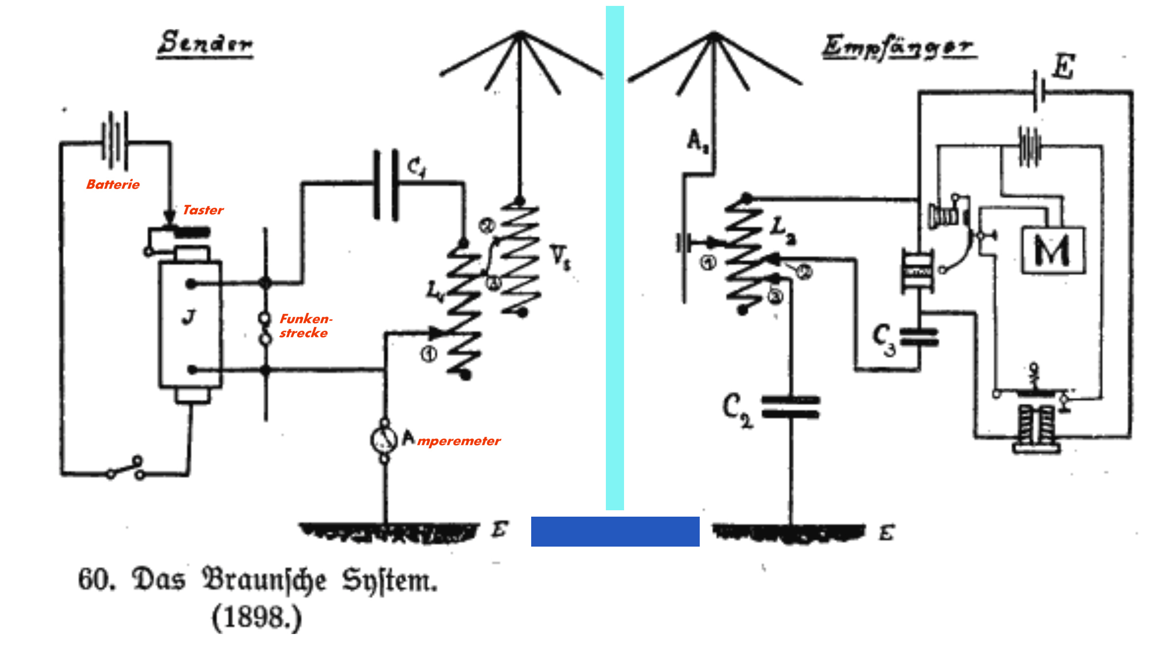 Schaltungsprinzip von Funkensender und Empfänger nach Braun 1898